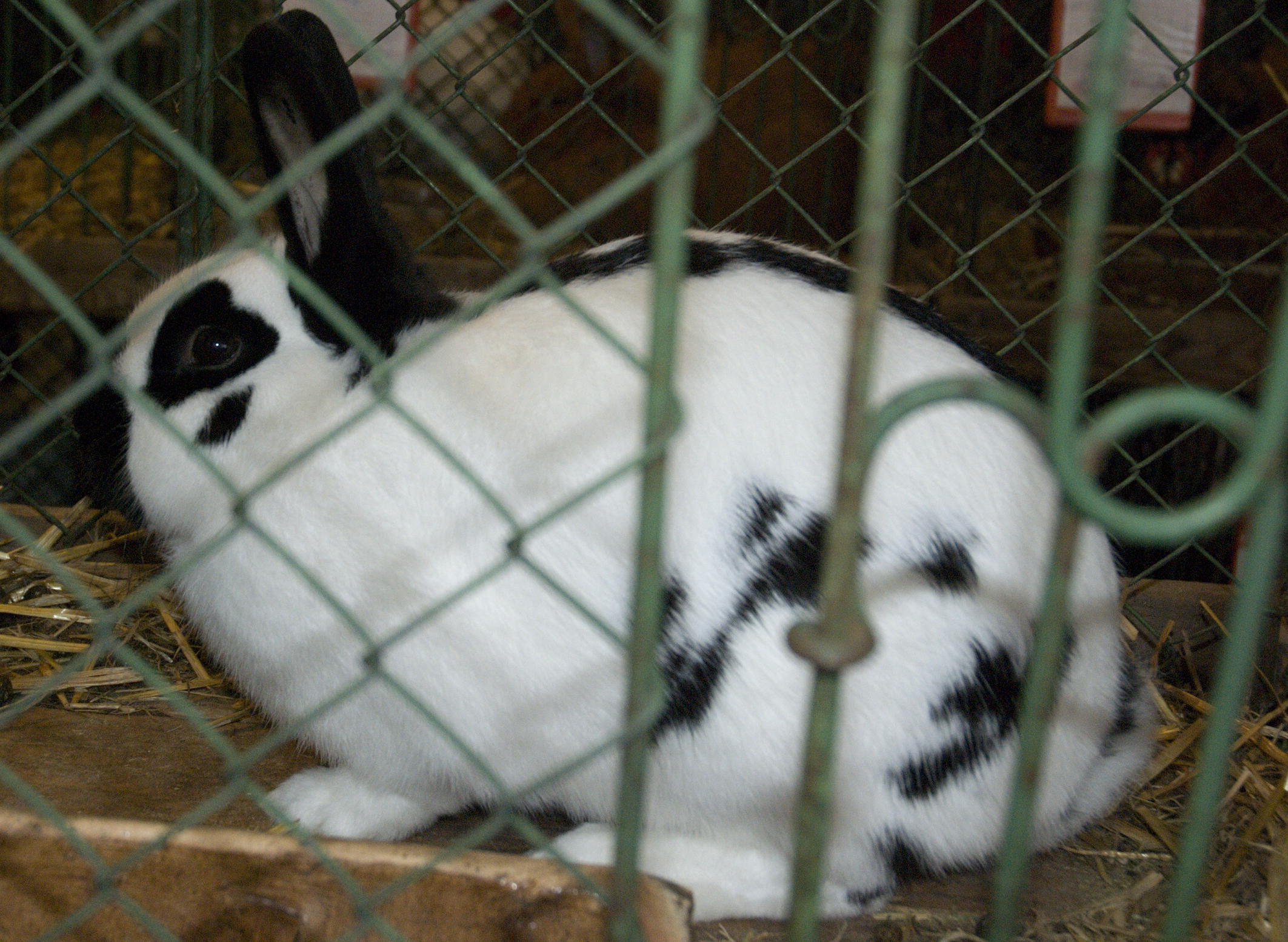 český strakáč černý